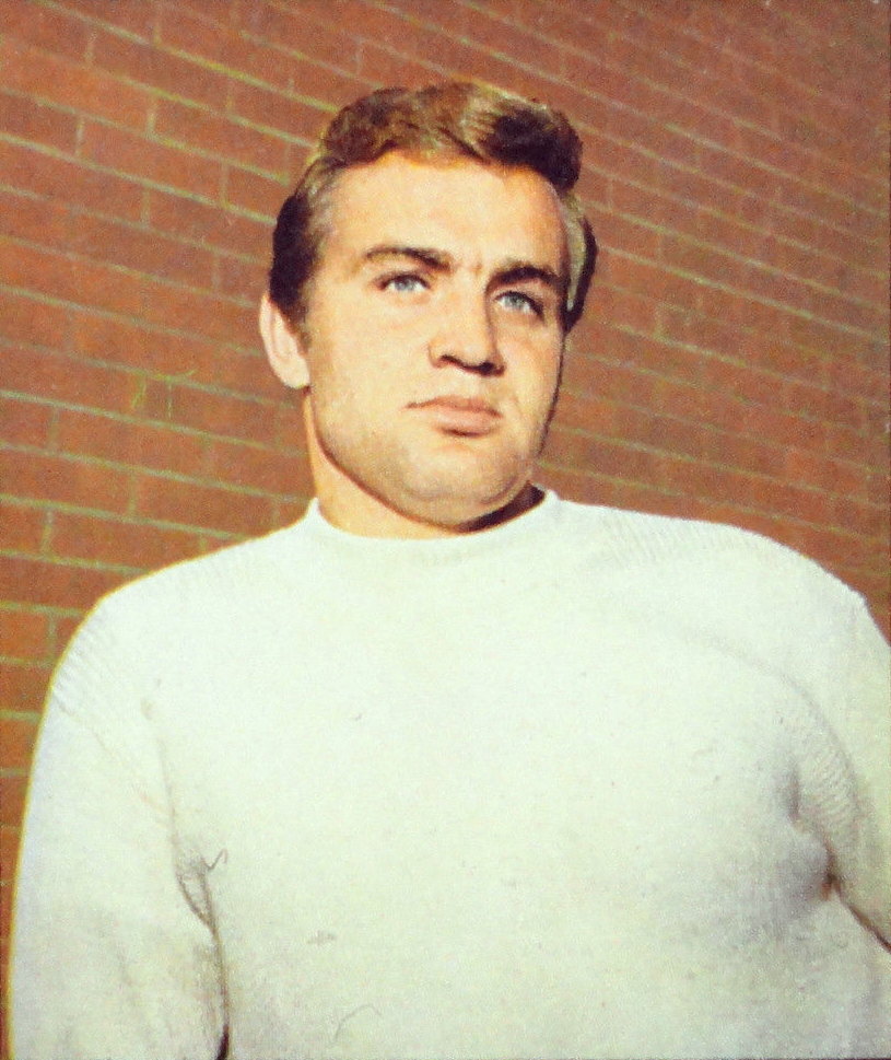 MUNCHEN 72-Figurina-Stickers-Panini-N° 112-BEYER recuperata